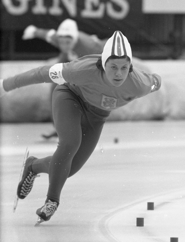 Ans Schut. Olympische Winterspelen te Grenoble. Ans Schut in actie op de 3000 meter.